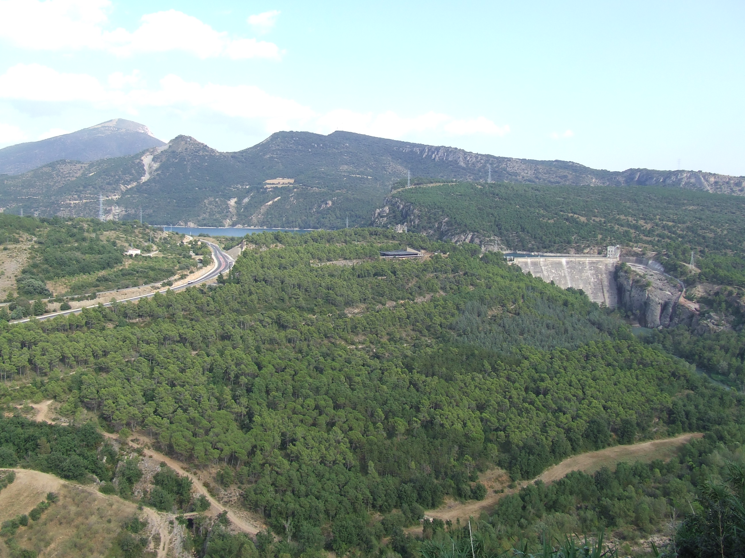 Susterris i el pantà de Sant Antoni des de Talarn (Pallars Jussà)